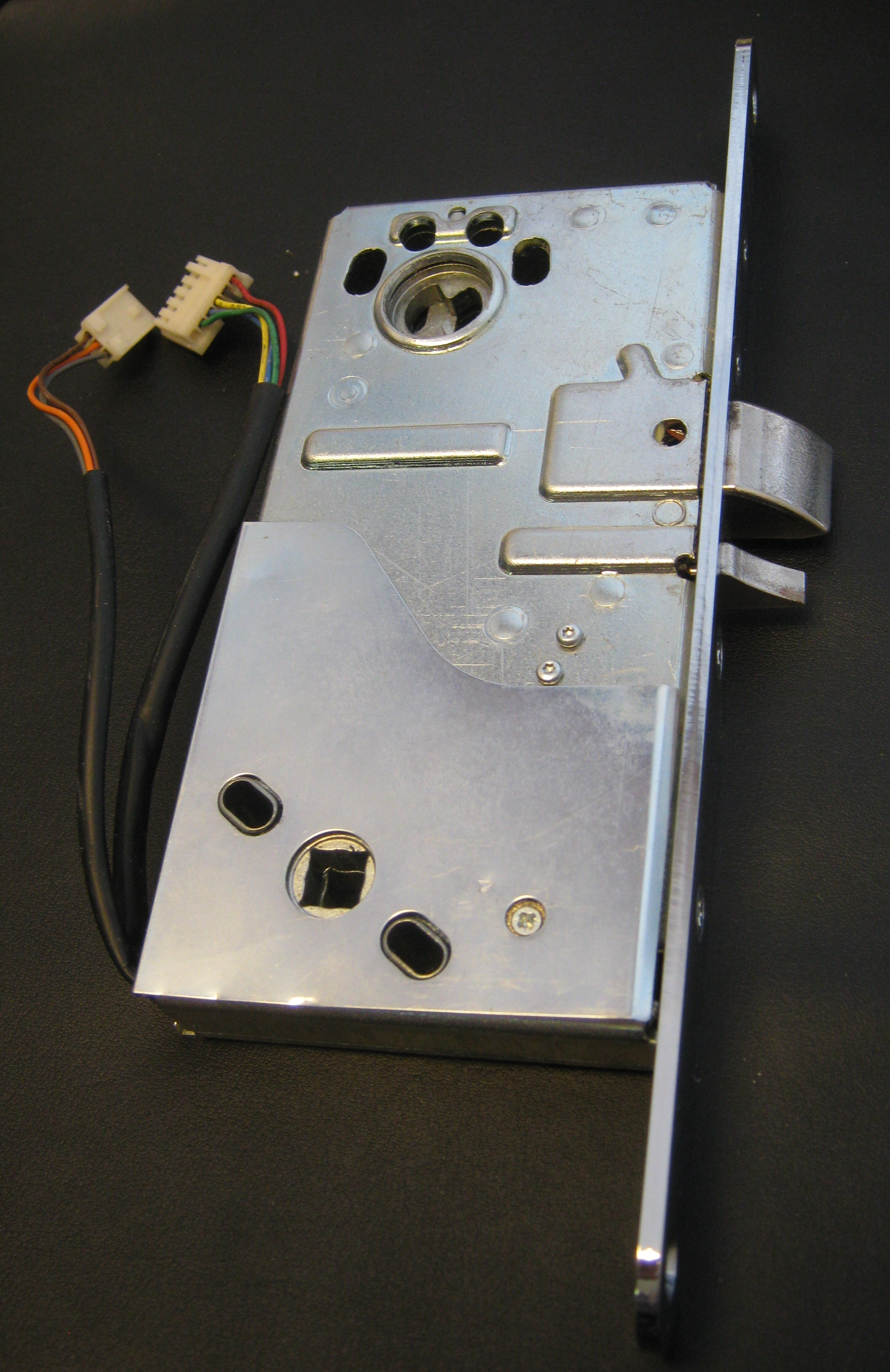 Solenoid Låskasse type Abloy EL 582